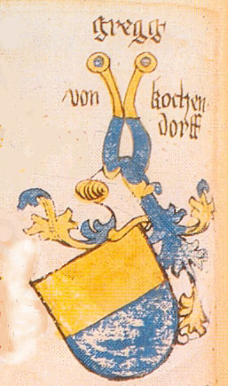 Ingeram-Codex der ehemaligen Bibliothek Cotta gregg von kochendorff freigestellt aus